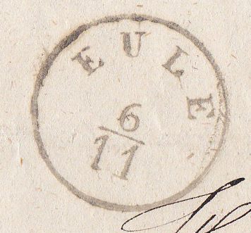 Oblitération postale EULE (Jílové u Prahy) de 1962